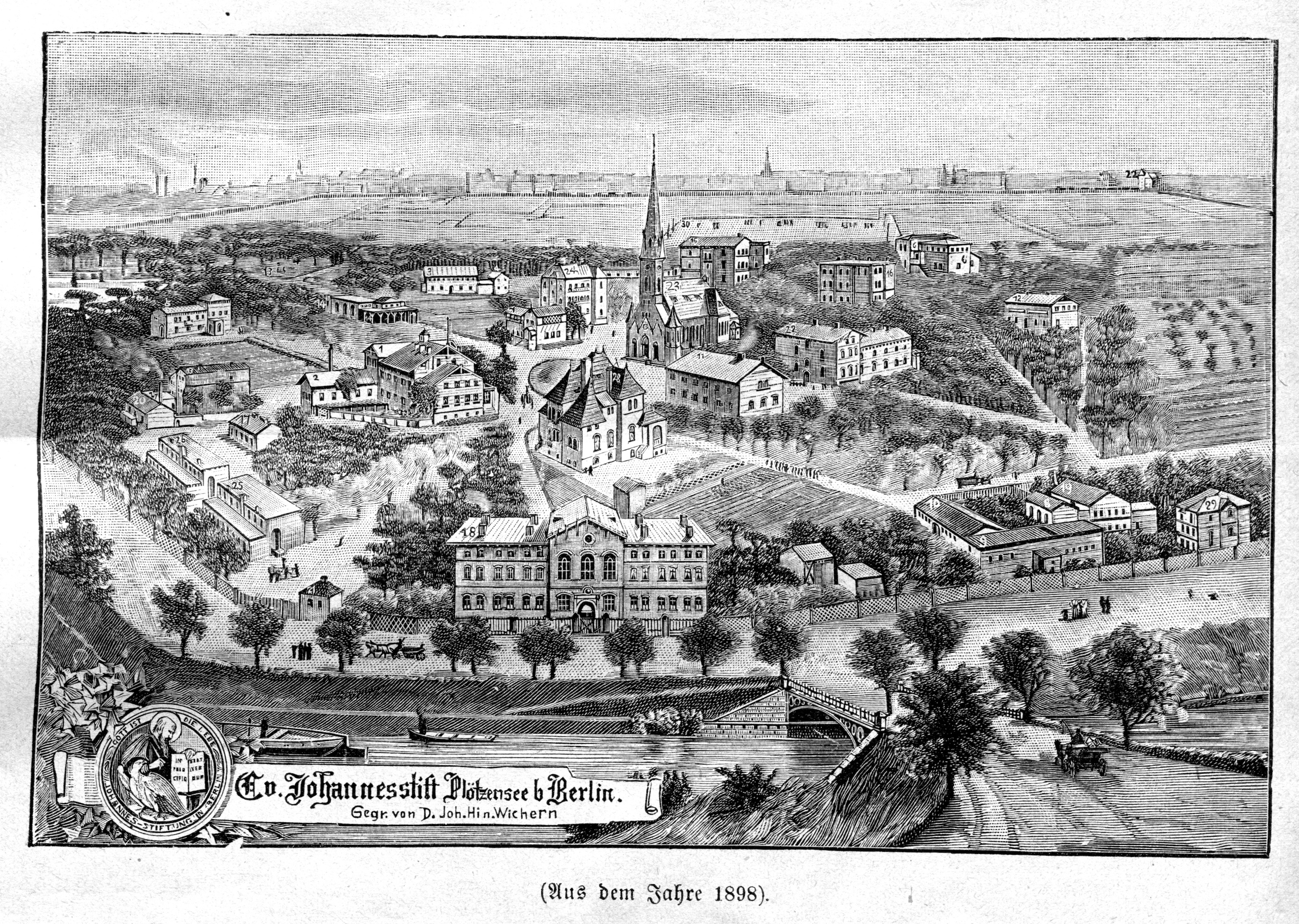 Die Zeichnung zeigt das Gelände und die Gebäude des Evangelsichen Johannesstifts in Berlin am alten Standort in Berlin-Plötzensee. Sie stammt aus einer Festschrift von 1908 zum 50jährigen bestehen des Johannesstifts. Laut Bildunterschrift ist die Zeichnung aber von 1898.